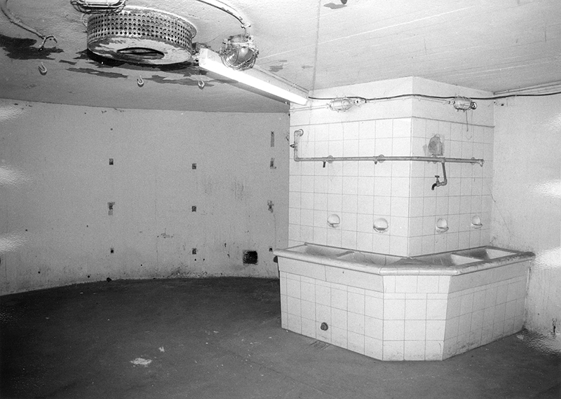 Einer der Mannschaftsräume im General-Wever-Turm in Heilbronn